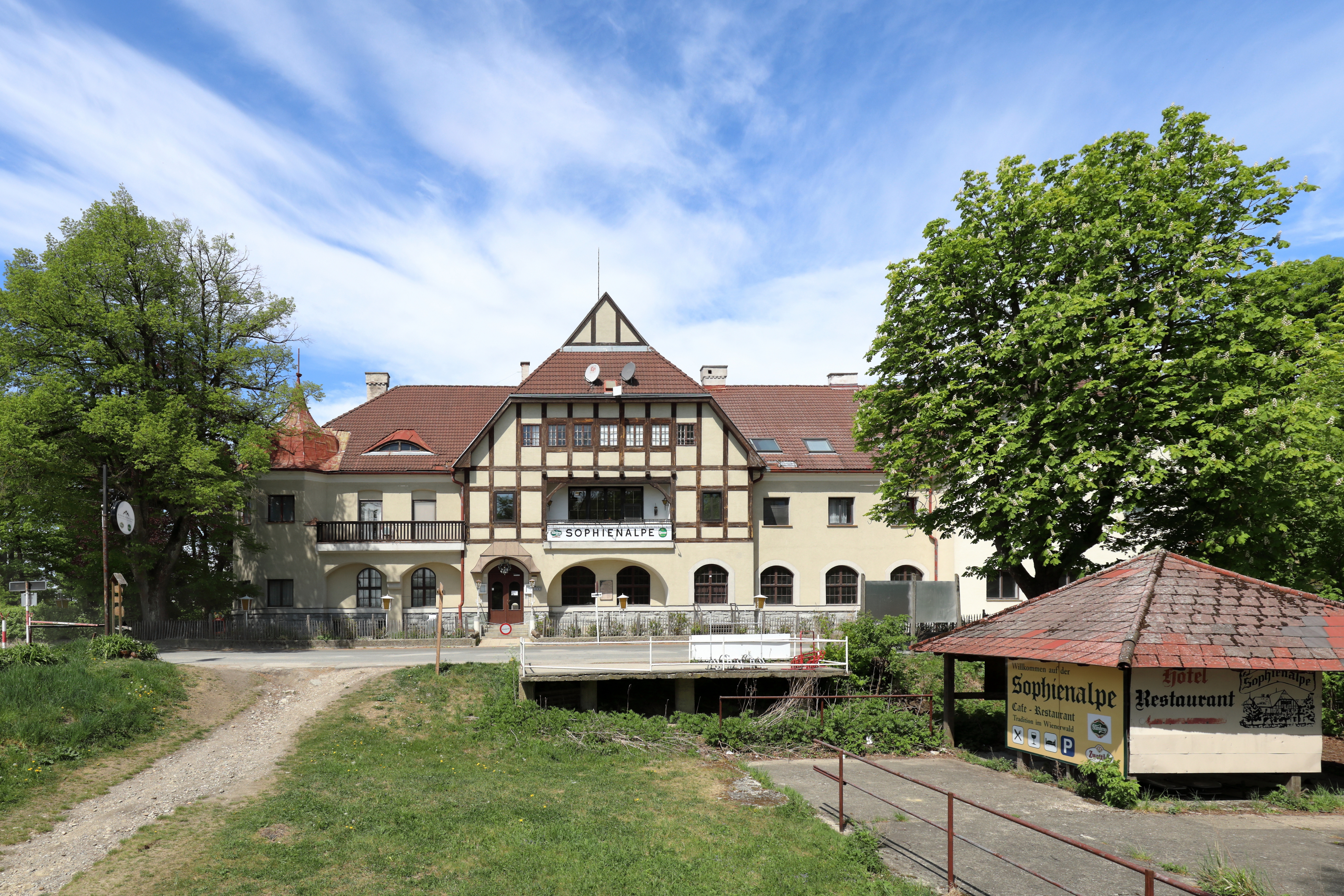 Südostansicht des Restaurants Sophienalpe an der Adresse Sofienalpenstraße 113 im 14. Wiener Gemeindebezirk Penzing.Das Ausflugsrestaurant wurde in der ersten Hälfte der 1910er-Jahre errichtet. Benannt ist die Gegend nach Erzherzogin Sophie, der Mutter Kaiser Franz Josephs, die hier oft den Sommer verbrachte.